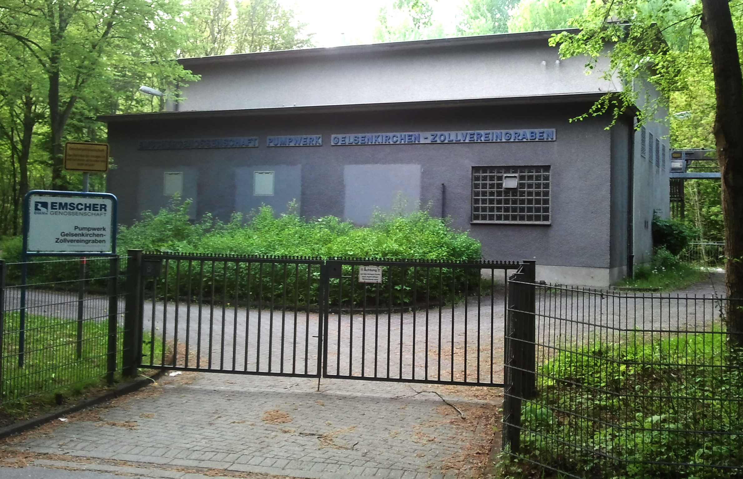 Pumpwerk Zollvereinsgraben